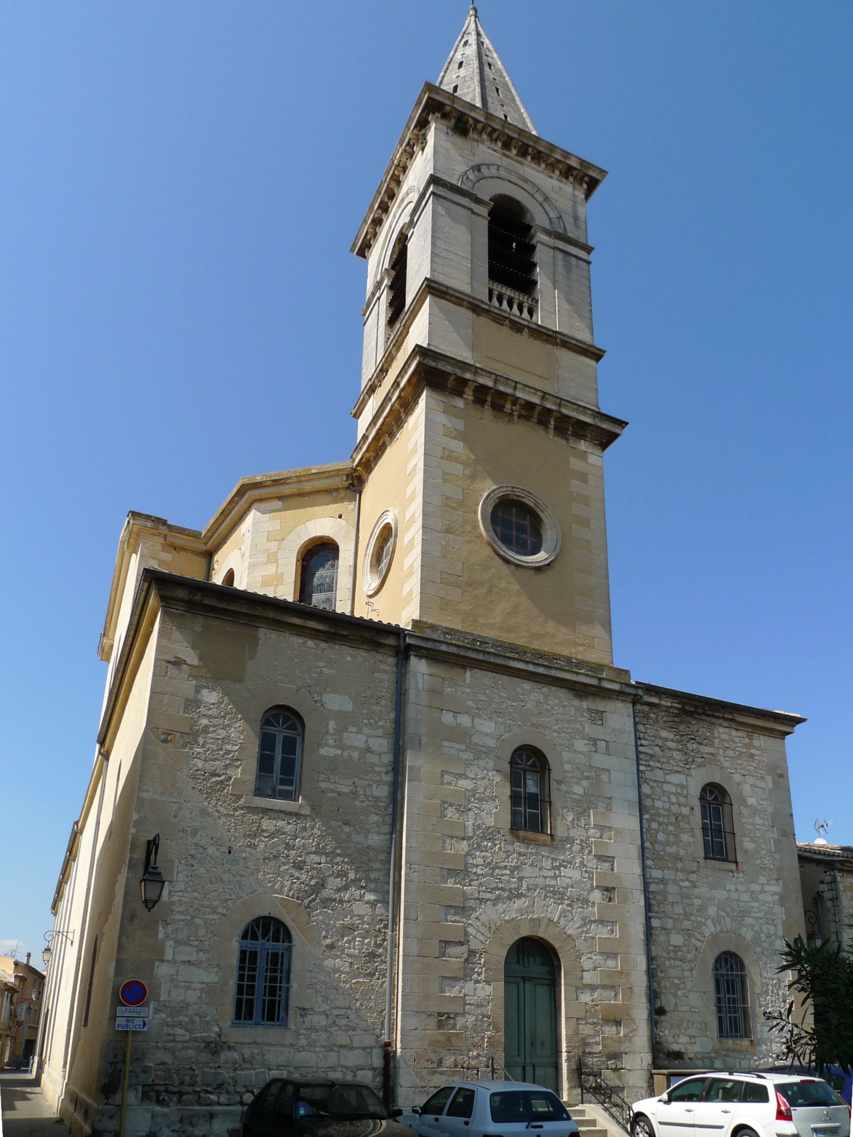 Église Saint-Jean-Baptiste de Pierrelatte